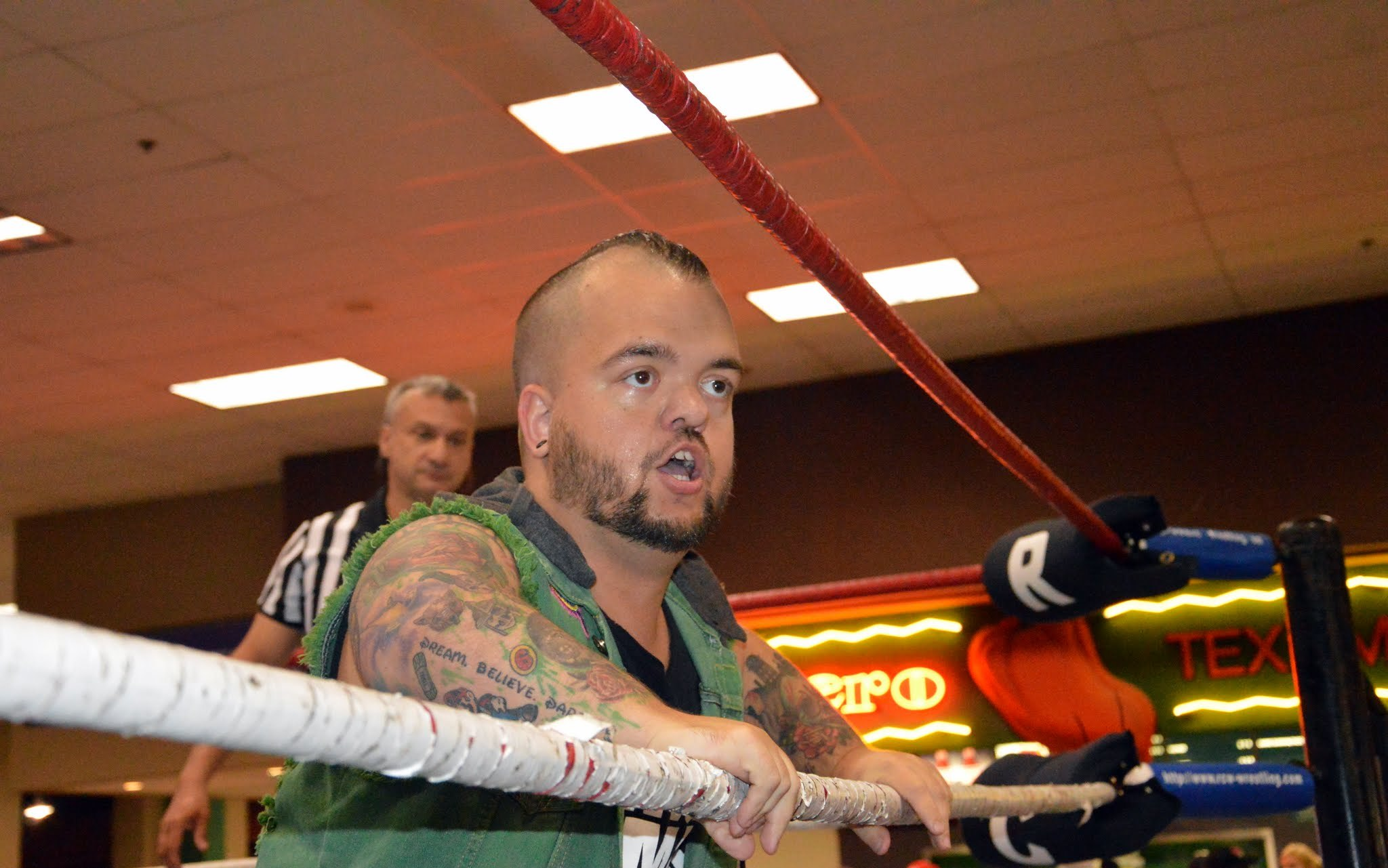 Le catcheur Hornswoggle en 2016.